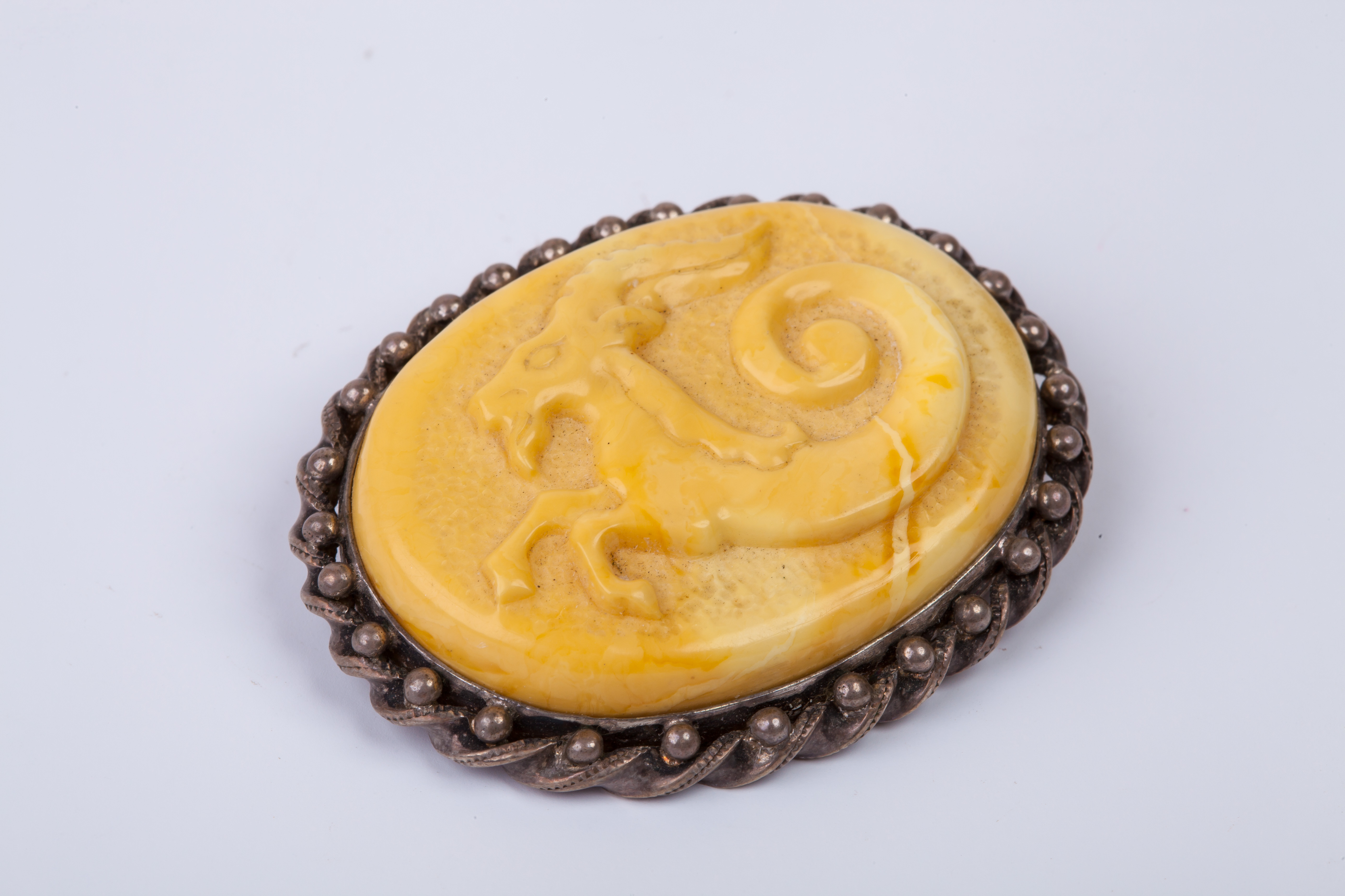 «Козерог», Эрнест Абрамович Лис, главный художник Янтарного комбината. 1990-е. Украшение из серебра 925 пробы с янтарём. Из коллекции демонстрационного зала Калининградского Янтарного комбината.